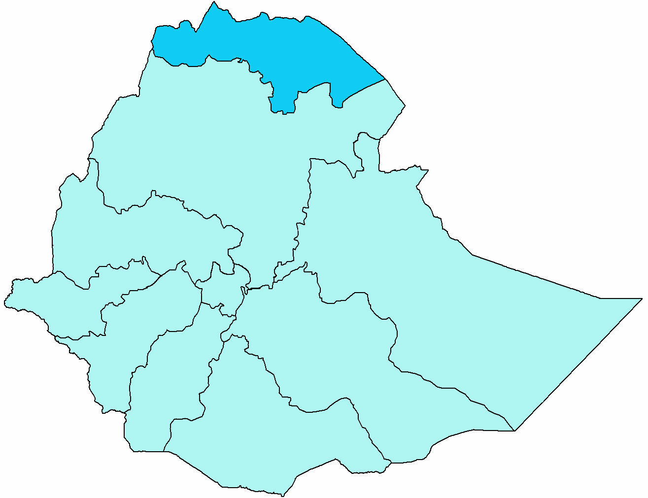 Mappa dell'eparchia cattolica di Adigrat, in Etiopia. Fonte per i confini della diocesi: Ethiopian Catholic Church